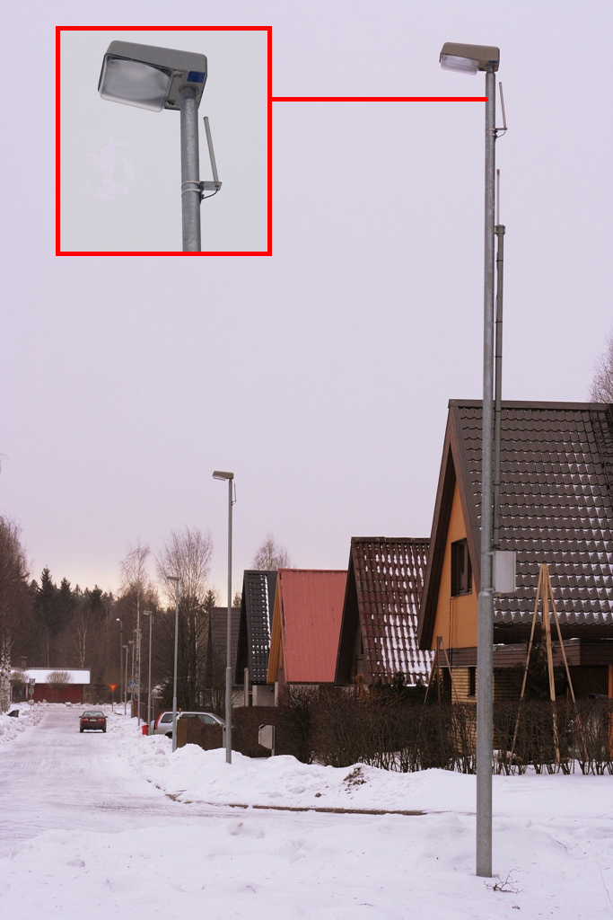 Philipsin Minikoffer 160HPX -katuvalaisimissa käytössä oleva langaton, älykäs valo-ohjaus Varkauden Niittykadulla.